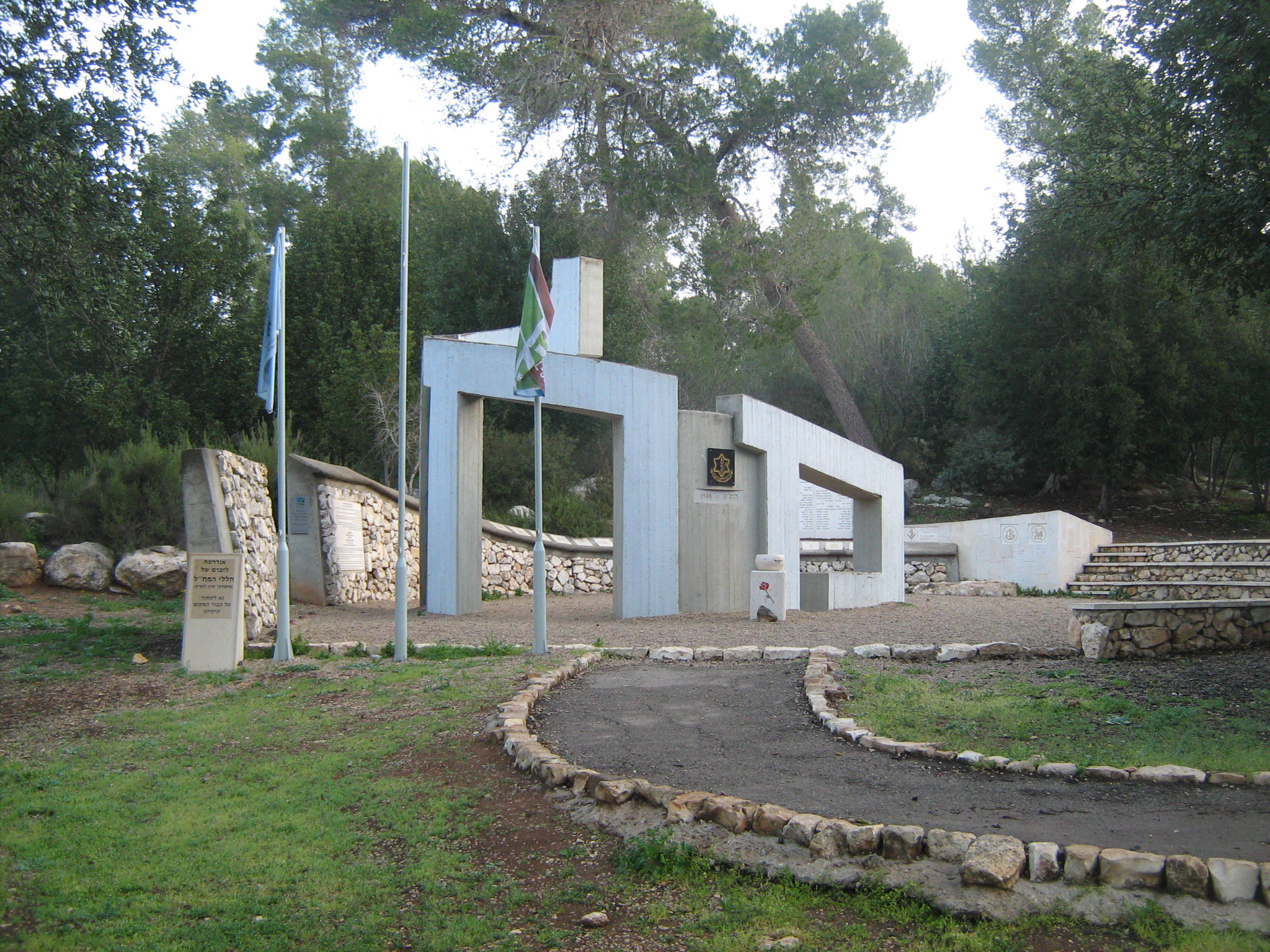 אנדרטת המח"ל